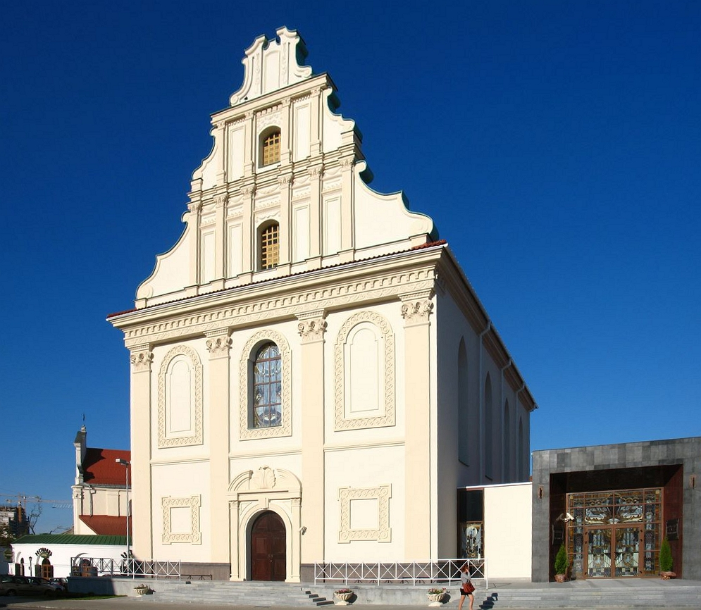 Царква Святога Духа